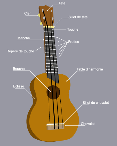 les éléments du ukulélé